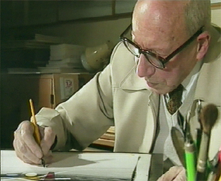 Portrait de Michel Seuphor